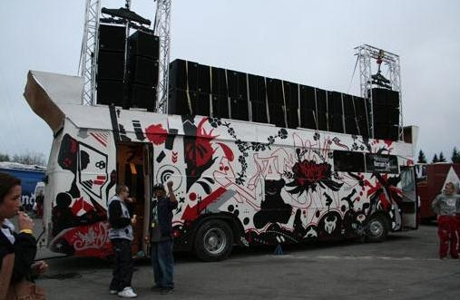 Den påkostede russebussen Psycho med sitt enorme lydanlegg fotografert på Tryvannshøgda i Nordmarka 10 km nordvest for Oslo sentrum i 2006.